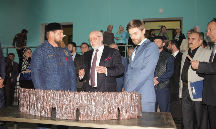 Председатель СПЧ Михаил Федотов принял участие в открытии передвижной выставки «Стена скорби» в Чеченской Республике